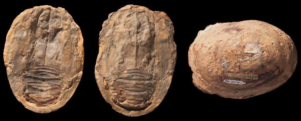 Sideritic nodule with 3D−preserved crustacean (Coleia gigantea [Van Straelen, 1923a], MHNGr.PA.10276−1,2), dorsal (C1, C2) and upper (C3) views, note the ovoid shape.